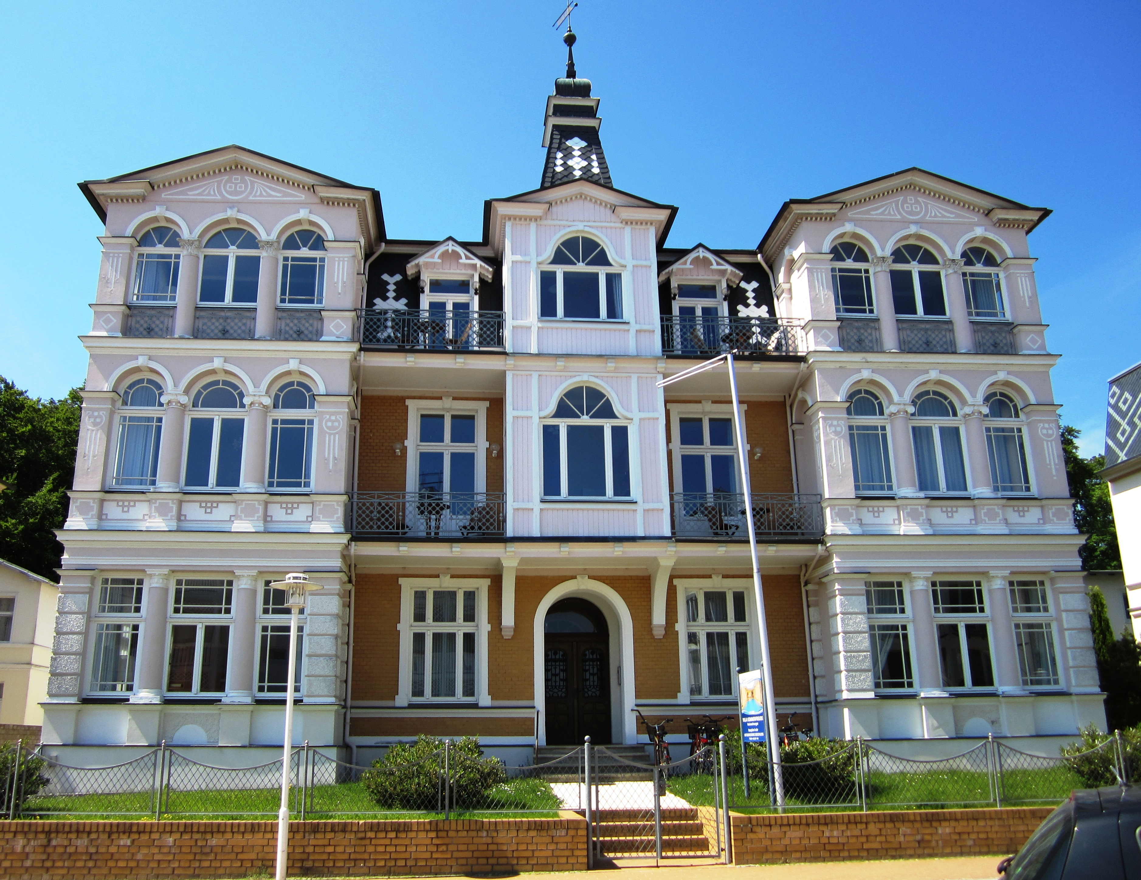 Denkmalgeschütztes Gebäude Villa Sommerfreude in Bansin, Bergstraße 21